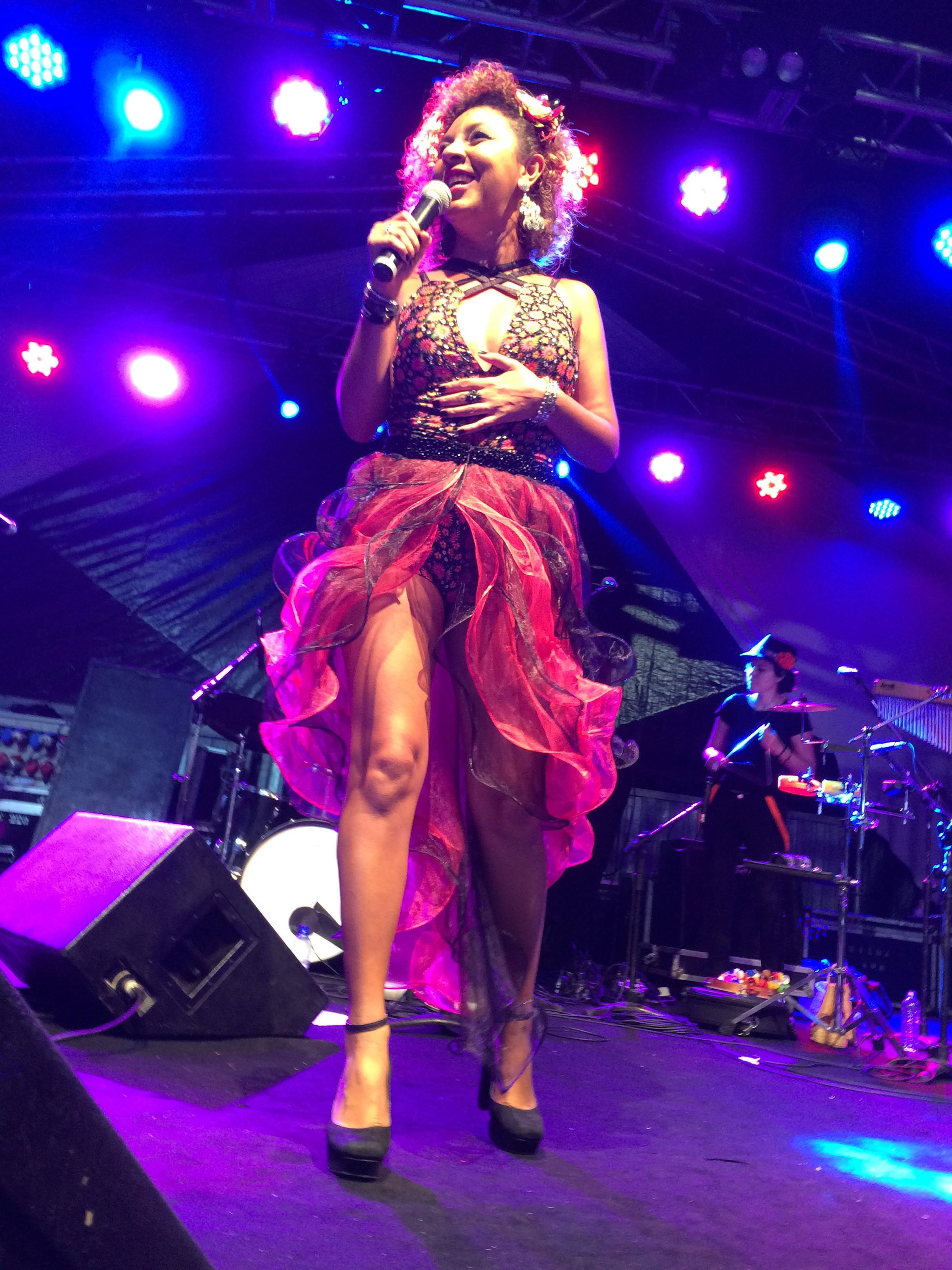 Sandra Belê no show "Estampada" na cidade de Bananeiras/PB, em 14 de agosto de 2016.